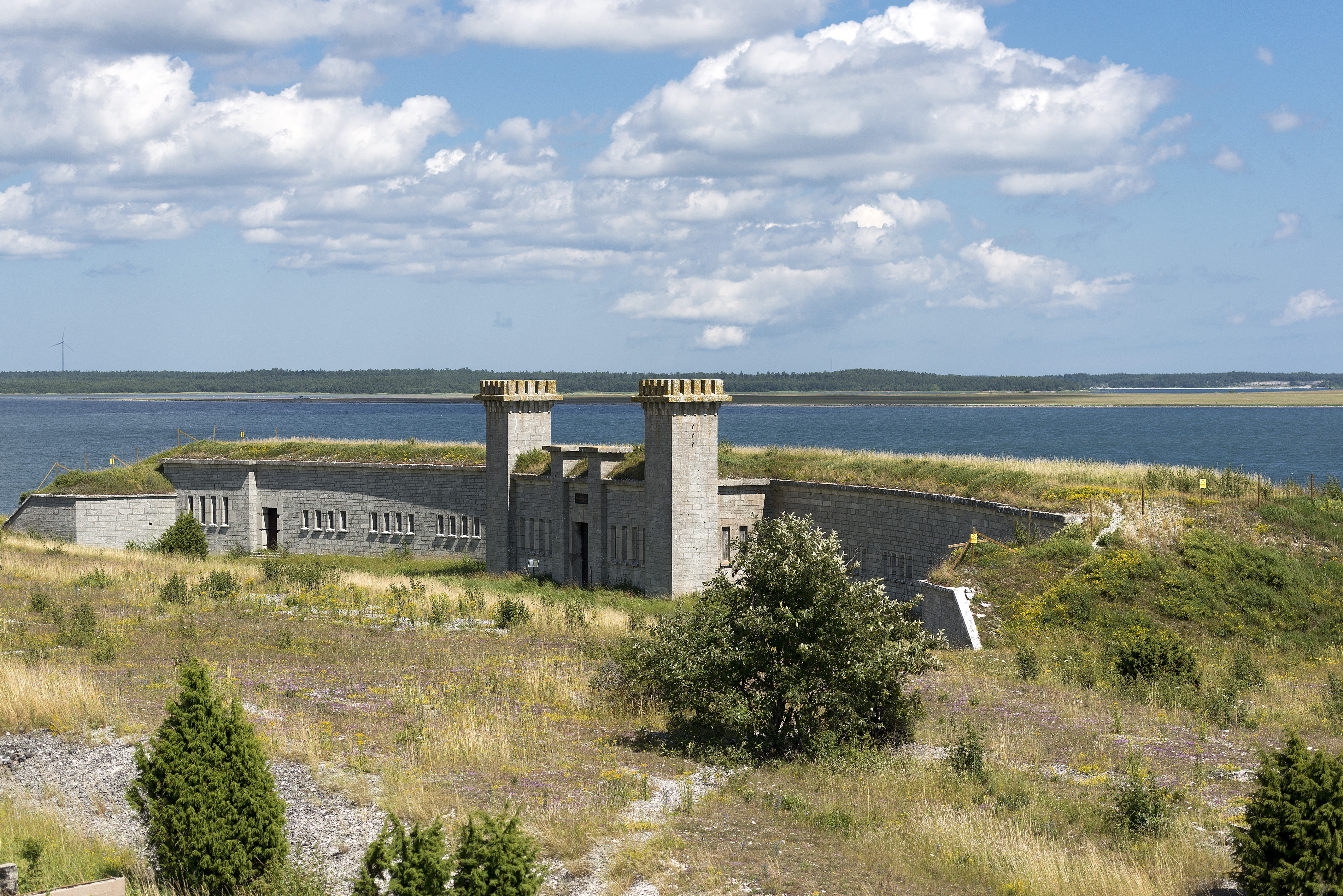 Östra batteriet